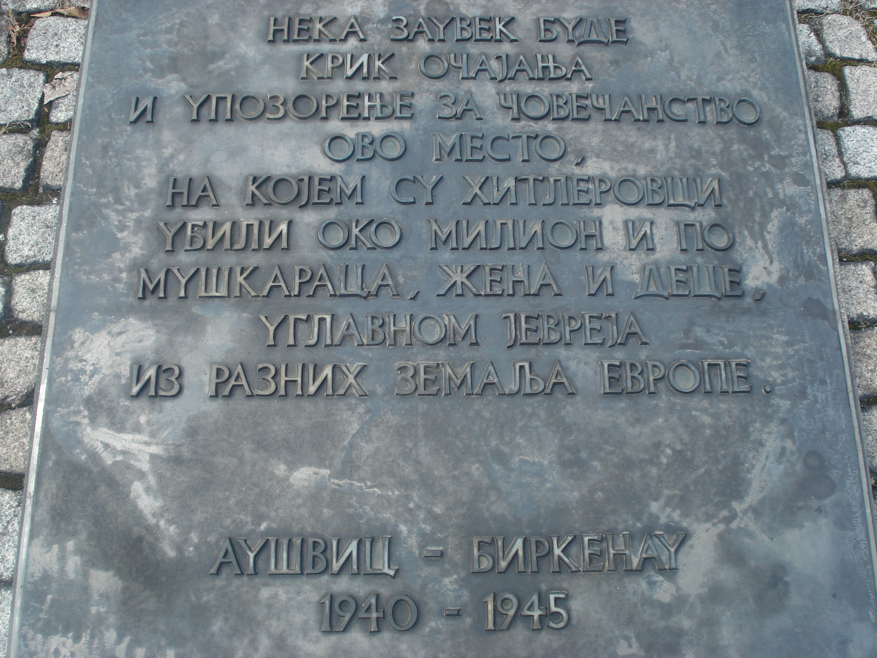 Spomenik na srpskom jeziku u Auschwitz'u